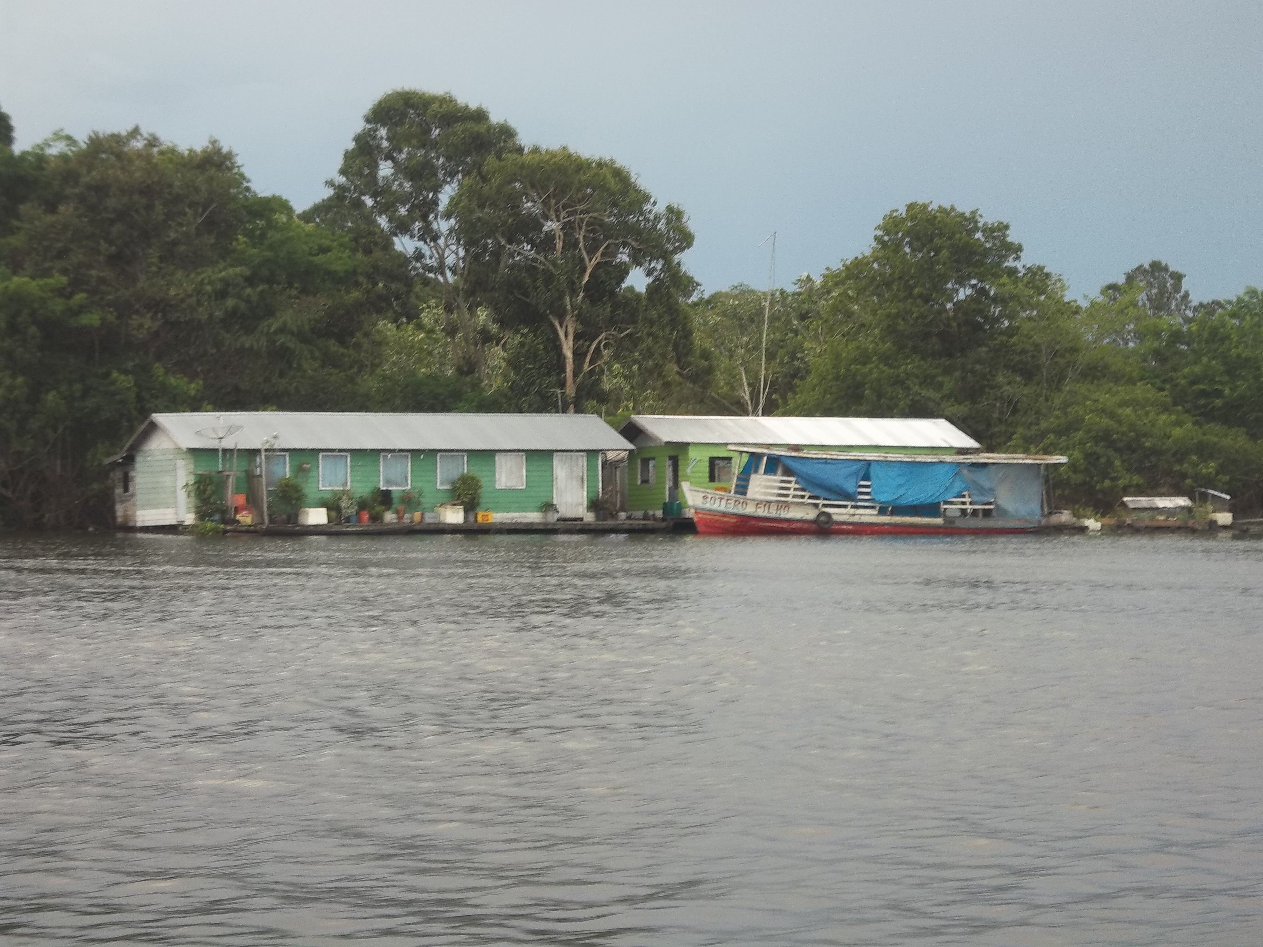 Casas flutuantes à beira do rio Amazonas, em Careiro da Várzea, estado do Amazonas, Brasil.